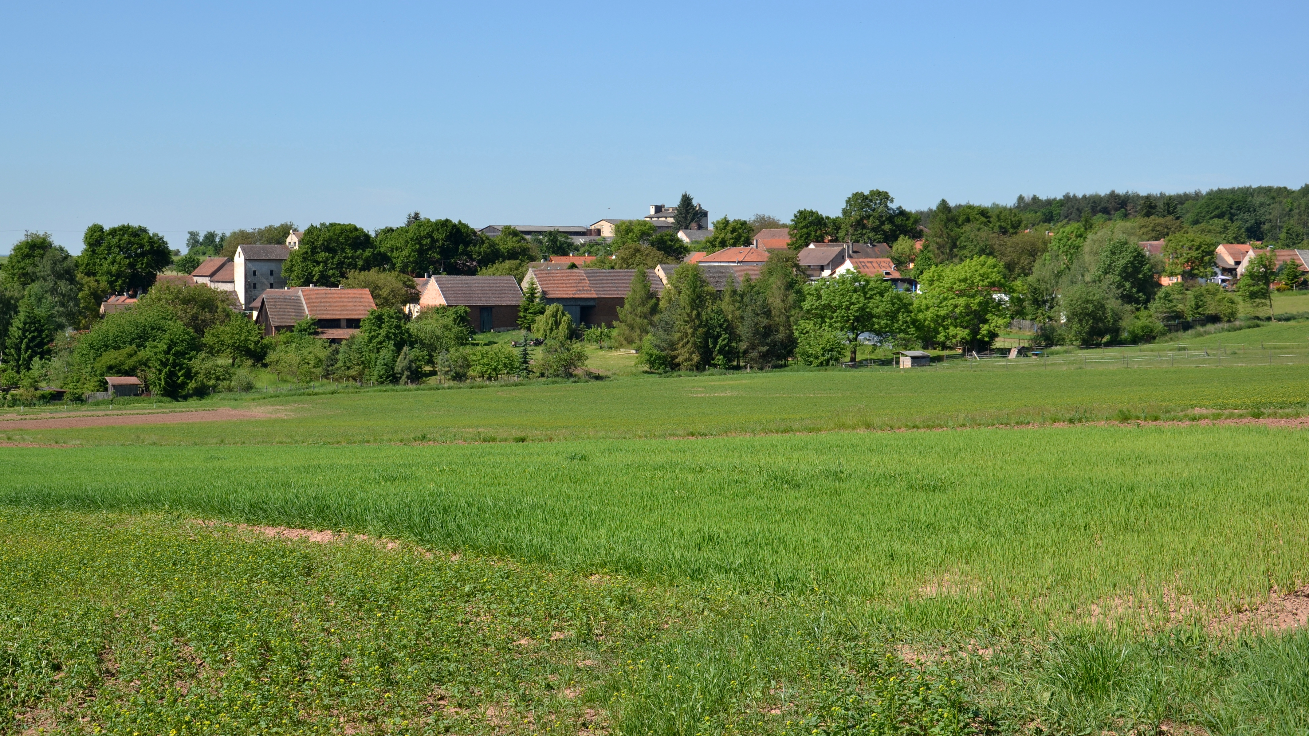 Janov – celkový pohled ze severu